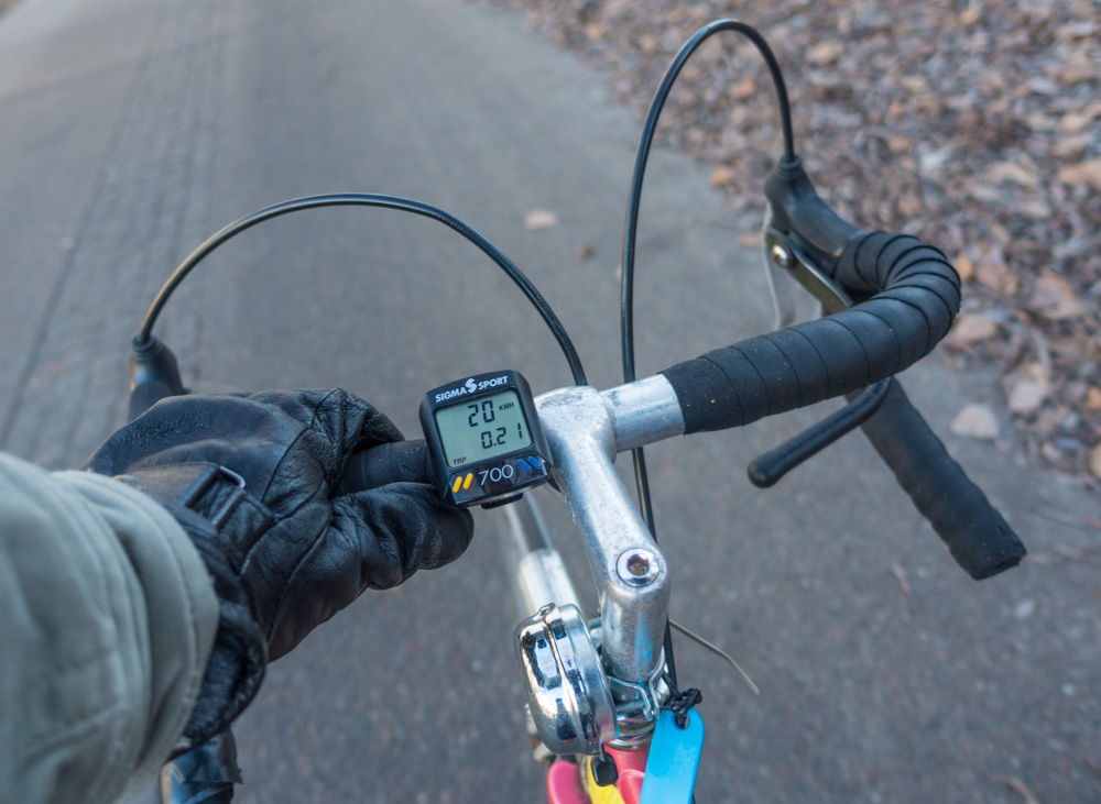 Cykeldator i full användning i februari 2017.